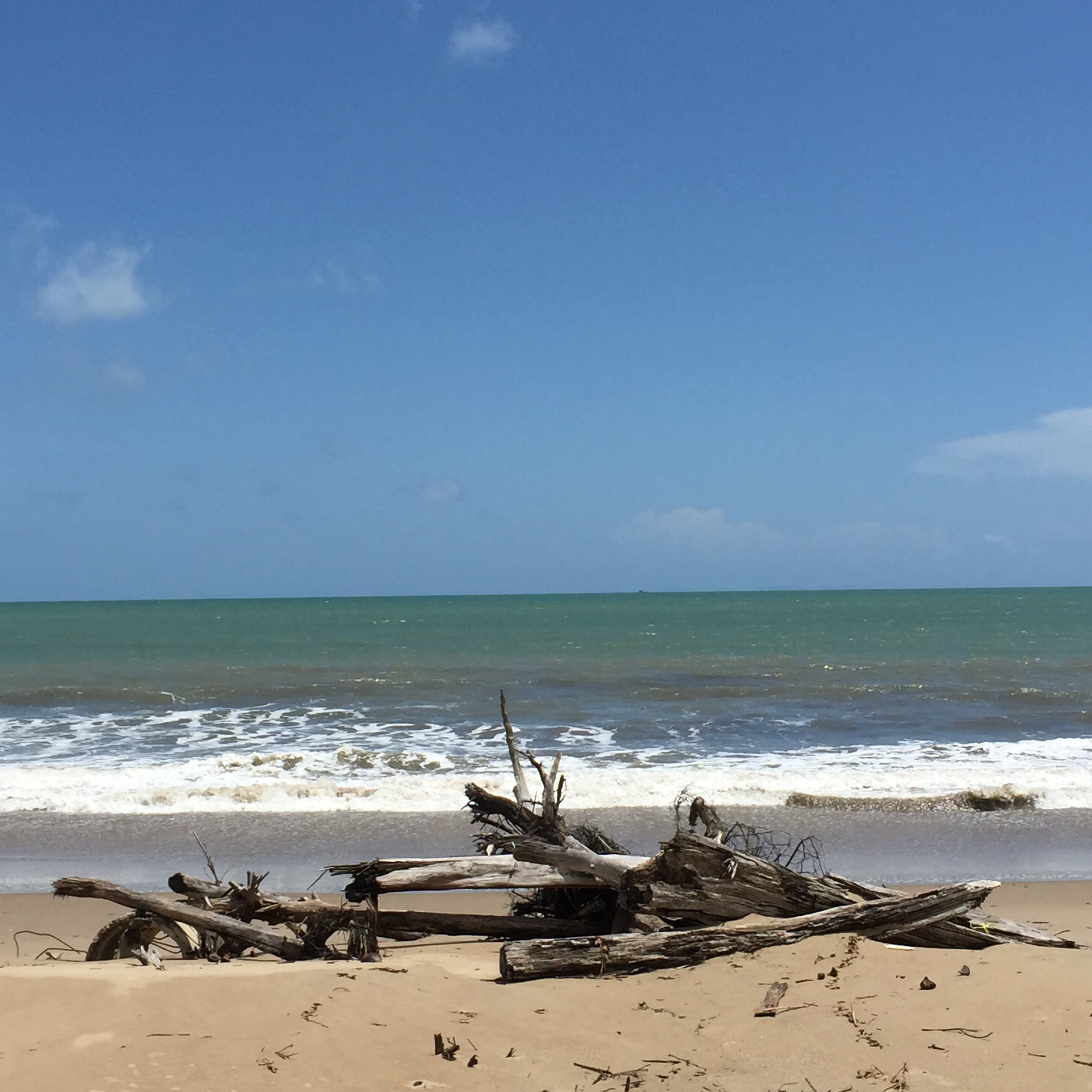 Kamphuan, Suk Samran District, Ranong, Thailand